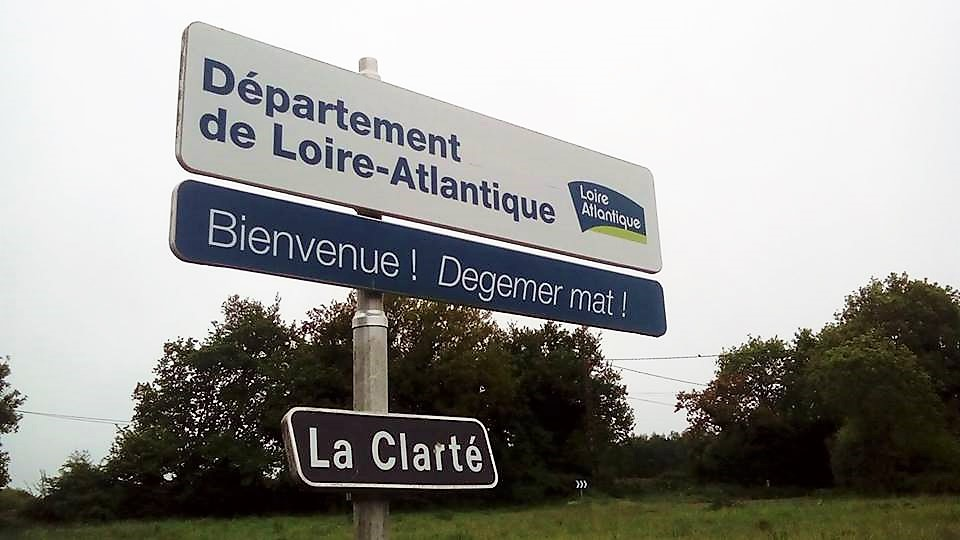 Panneau bilingue français-breton - Loire-Atlantique (à La Clarté, près du département du Morbihan)